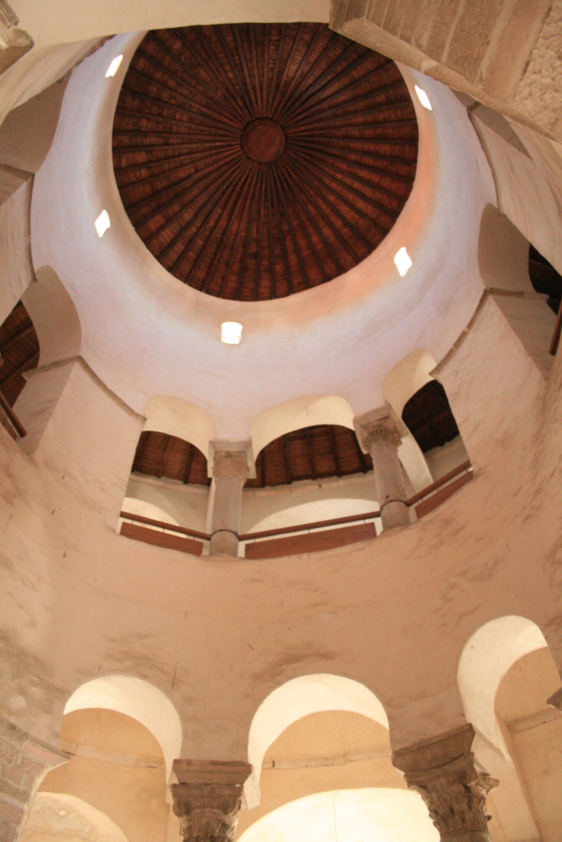 Església de Sant Donat. Zadar. Croàcia.